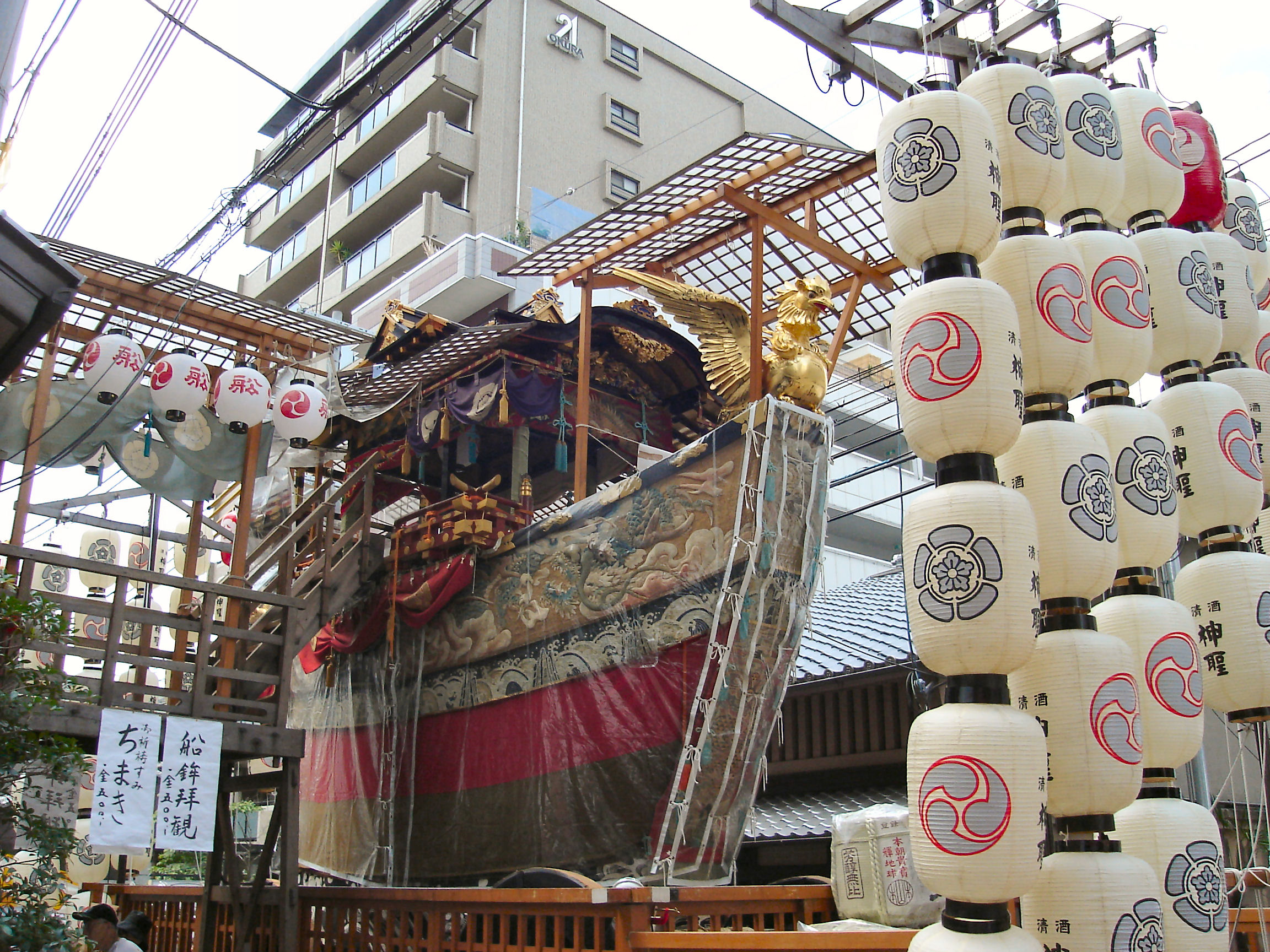 Funa Boko(船鉾)